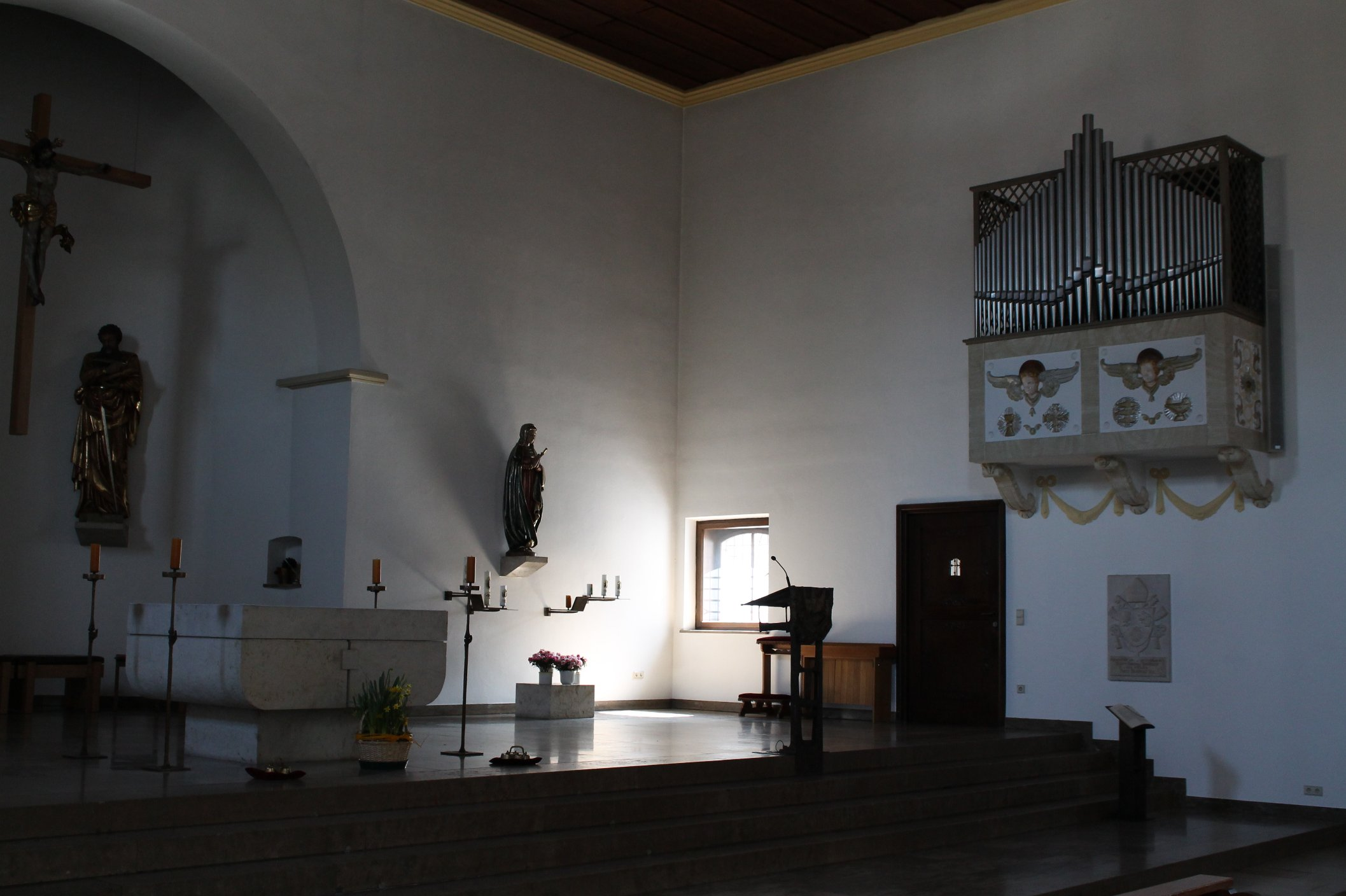 Chor mit Altar und Altarorgel von St. Peter und Paul in München-Trudering